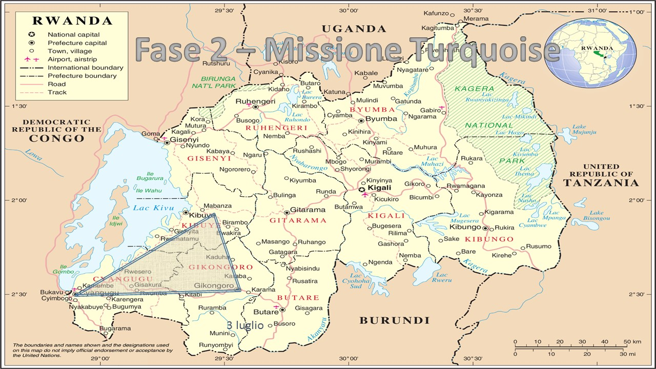 FaseZonaUmanitariaOperazioneTurhchese